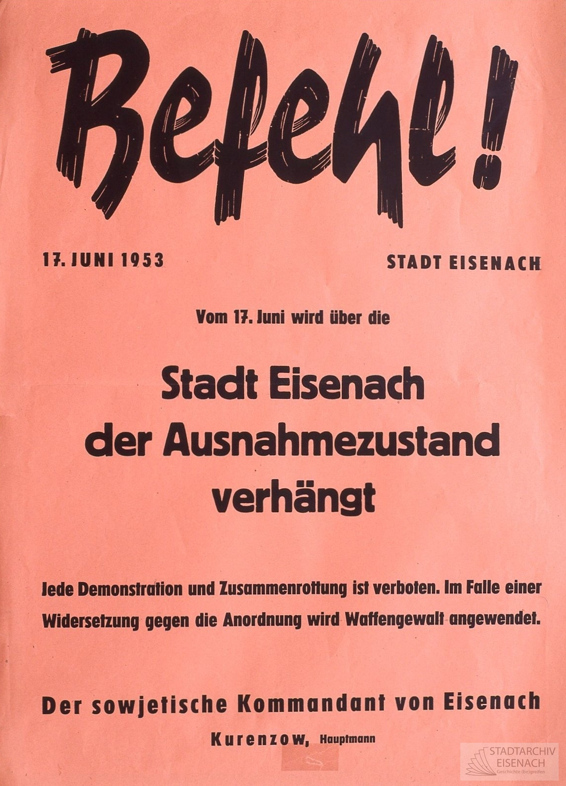 Bekanntmachung des sowjetischen Stadtkommandanten über die Verhängung des Ausnahmezustandes am 17. Juni 1953